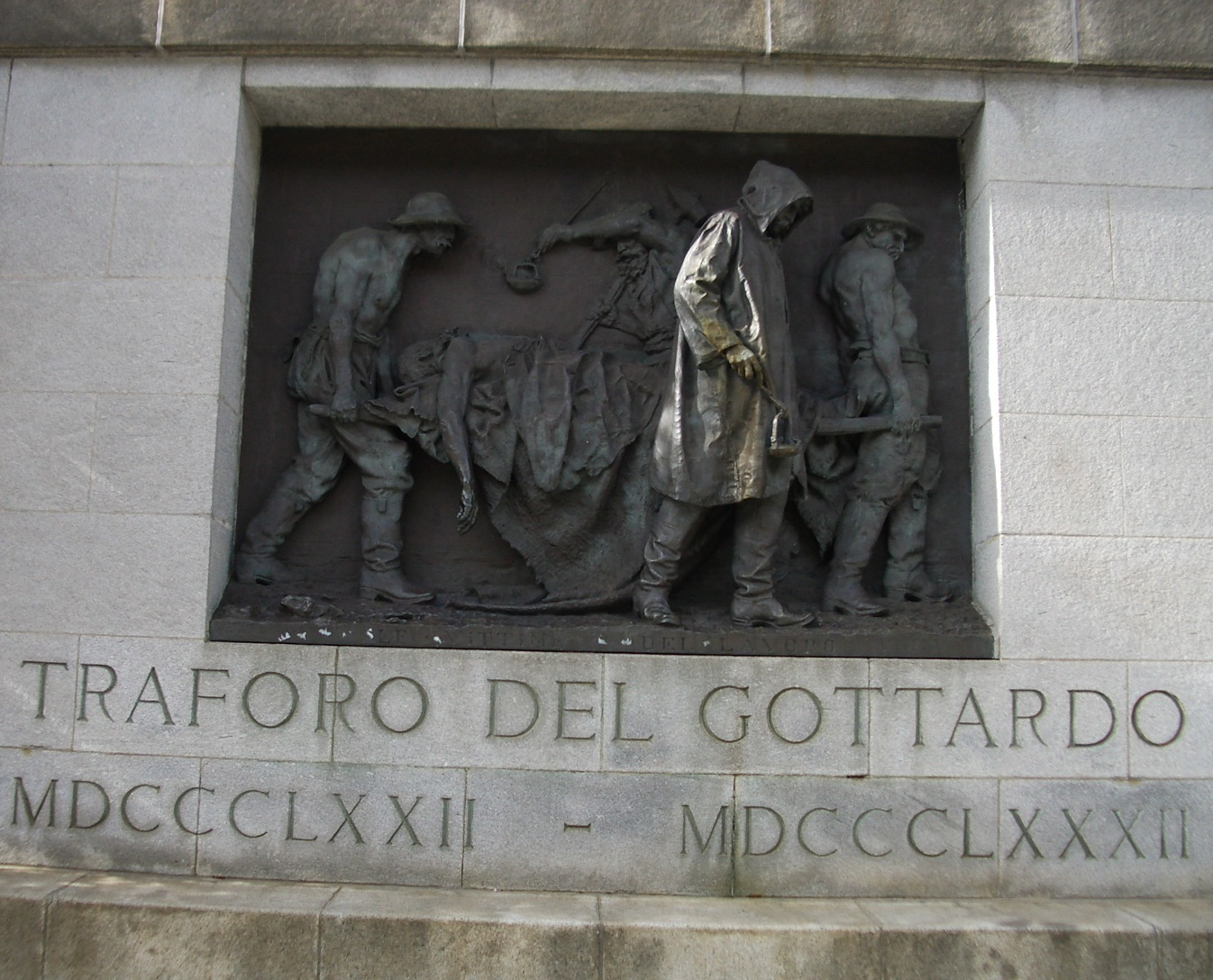 In memoria delle 199 vittime del Traforo del Gottardo, sul piazzale antistante la stazione ferroviaria di Airolo sorge questo monumento che integra un bassorilievo in bronzo (Vittime del lavoro, 1882/1883) dello scultore ticinese Vincenzo Vela. Fu posato nel 1932 dalla direzione delle FFS. L'epigrafe recita: Nel 50° anniversario della grande umana vittoria che dischiuse fra genti e genti la via del San Gottardo, questa pietra ove l'arte segna e consacra l'oscura eroica fatica del lavoratore ignoto.